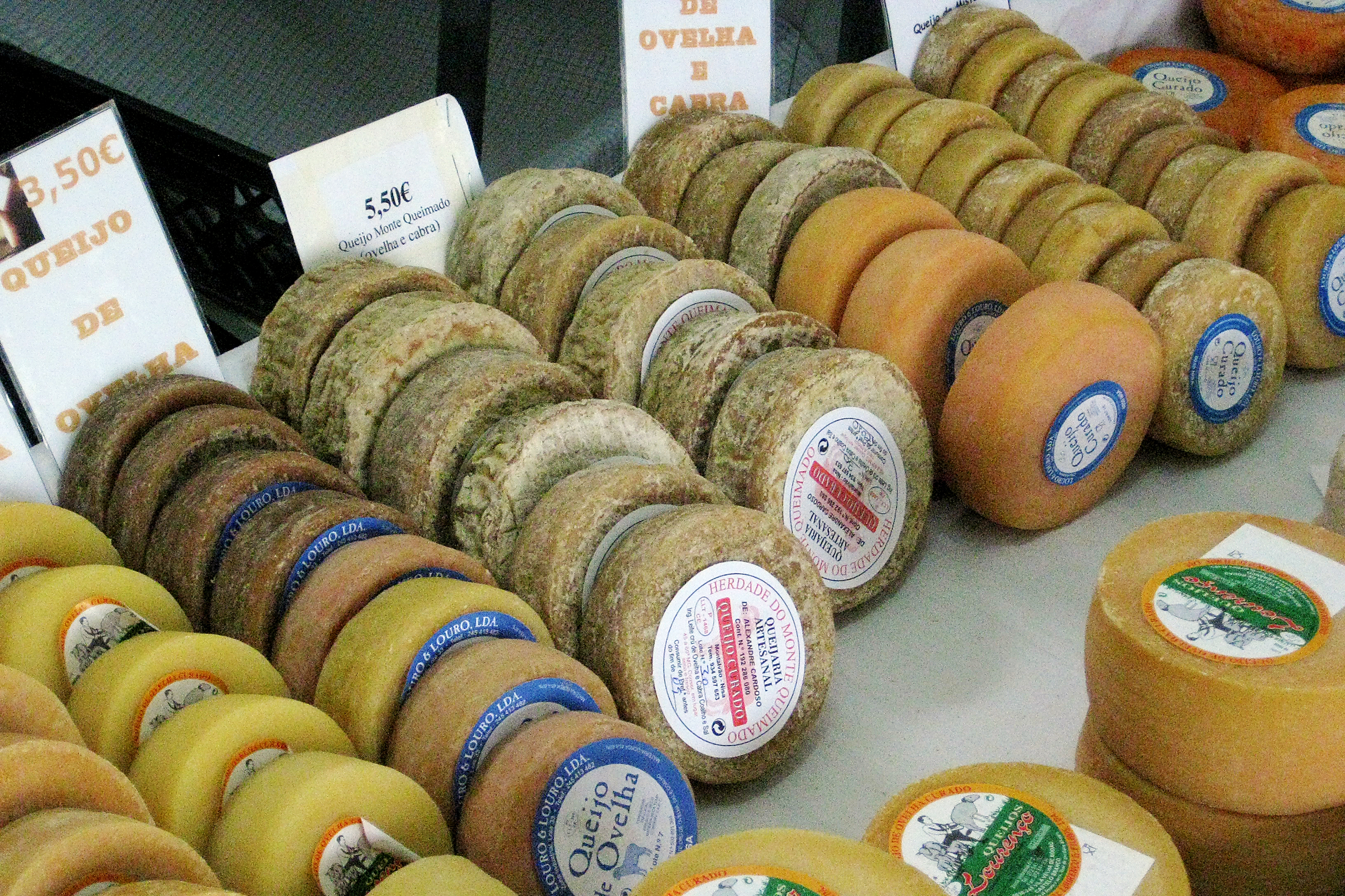 Queijo de Nisa